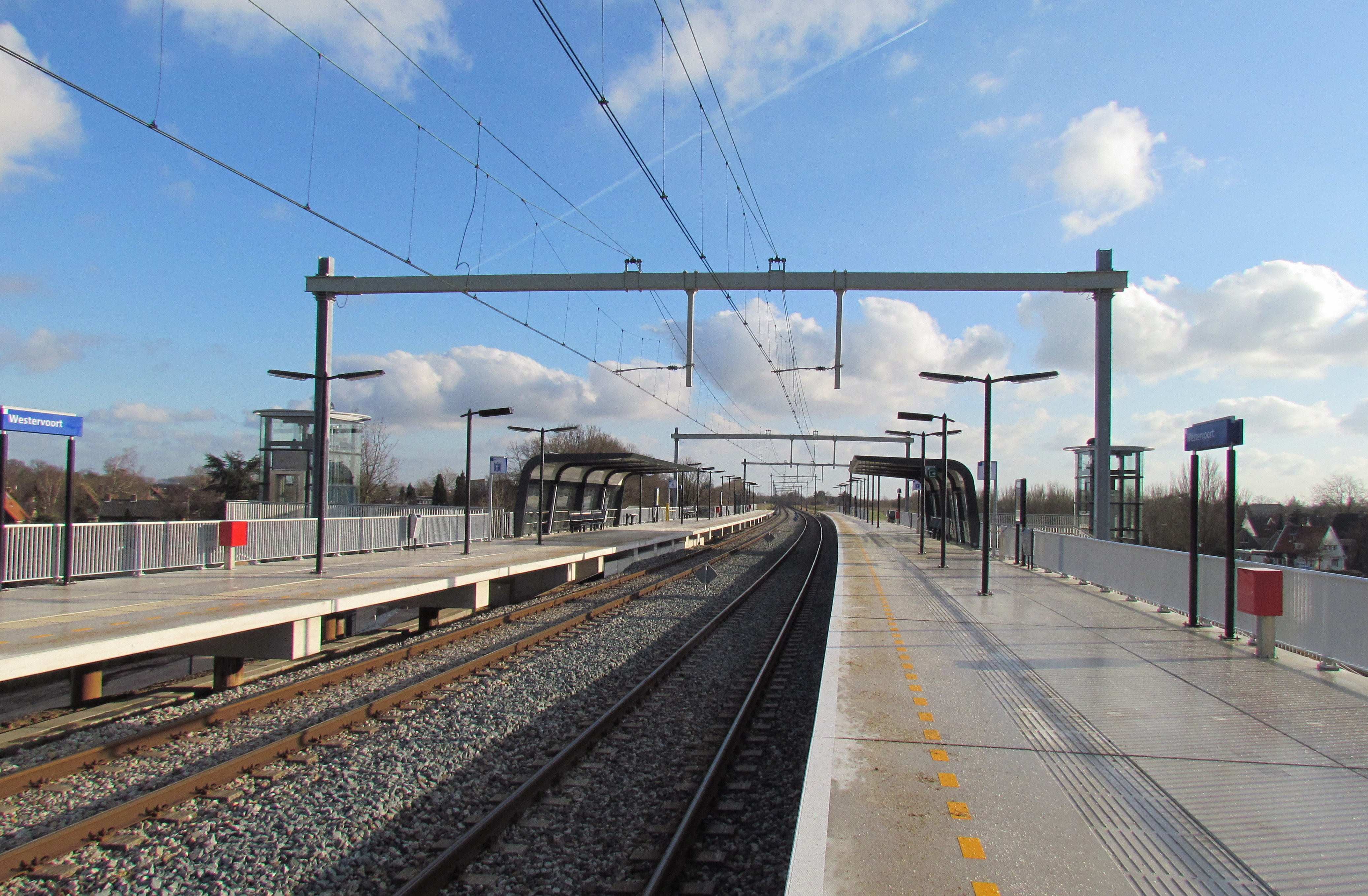 Station Westervoort (geopend 11 december 2011), perrons in oostelijke richting